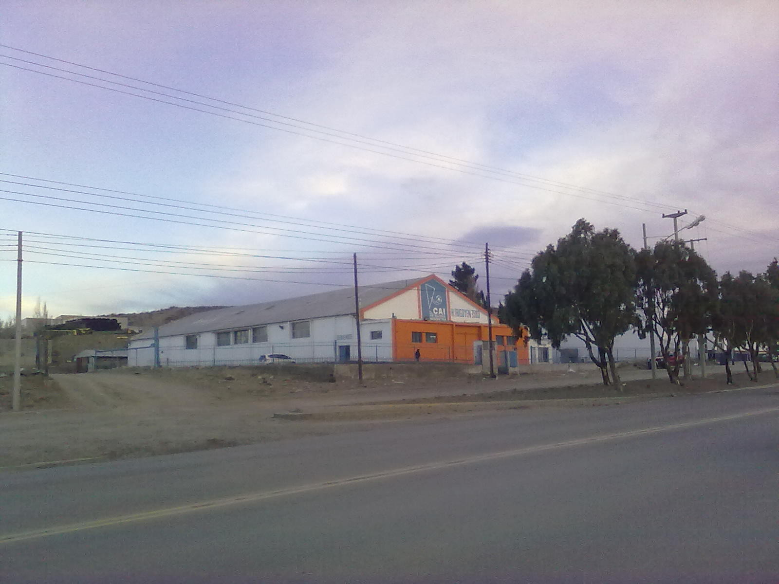 la cancha de futbol 5 de la CAI